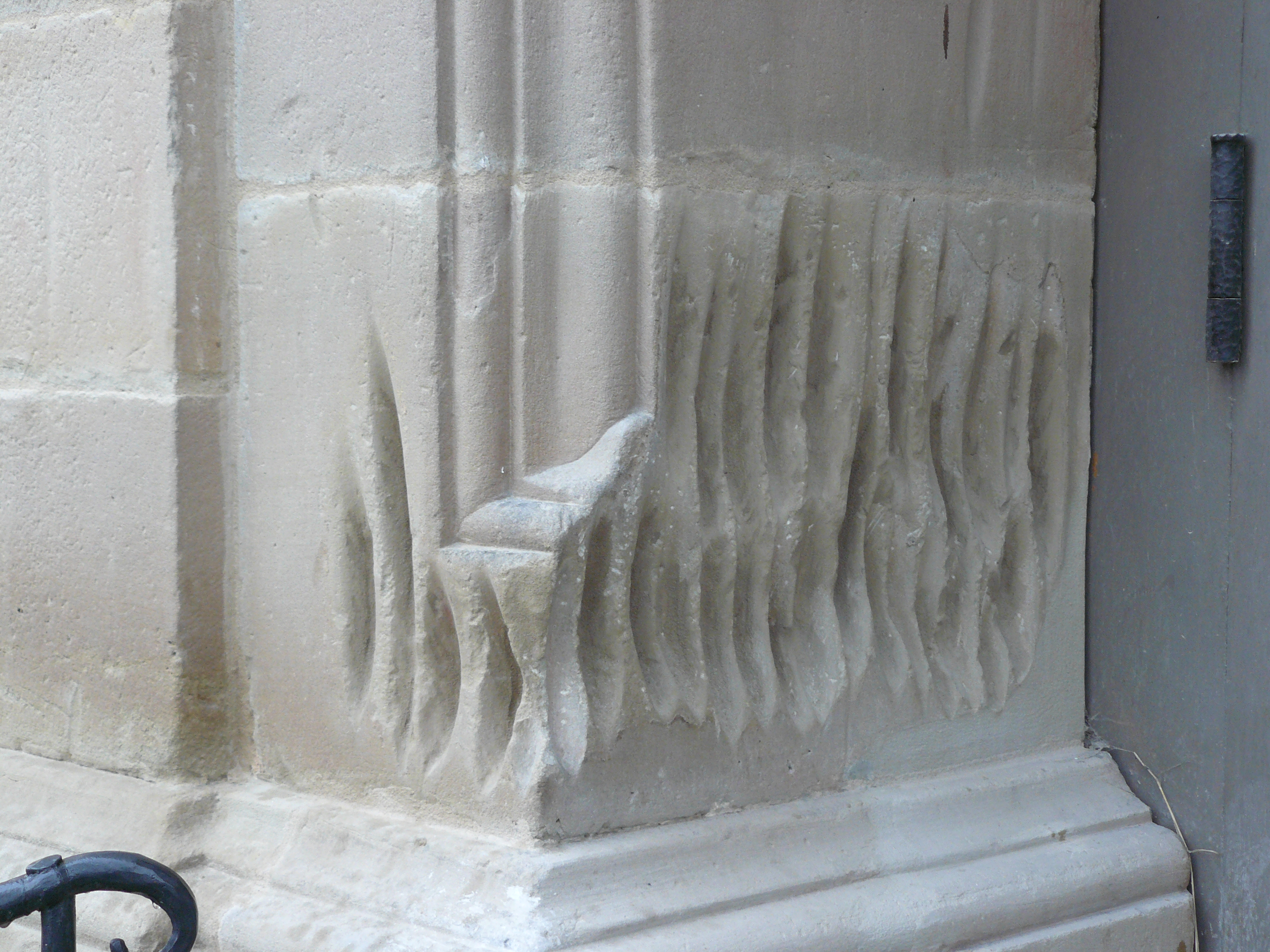 Wetzrillen am Brauttor der St. Michaelskirche am Gurtstein in Weidenberg